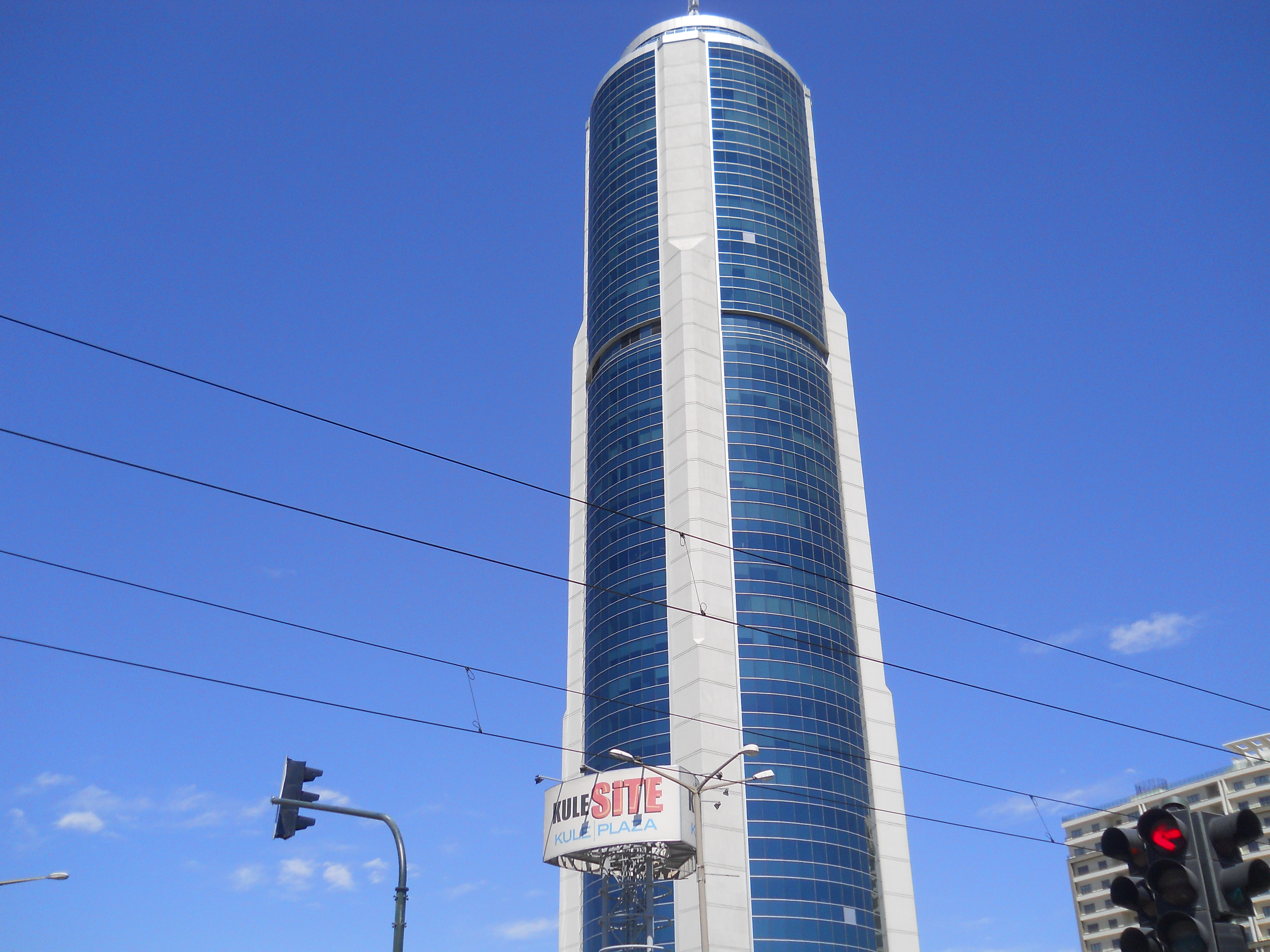 Konya'daki Kulesite binasından görünüm.